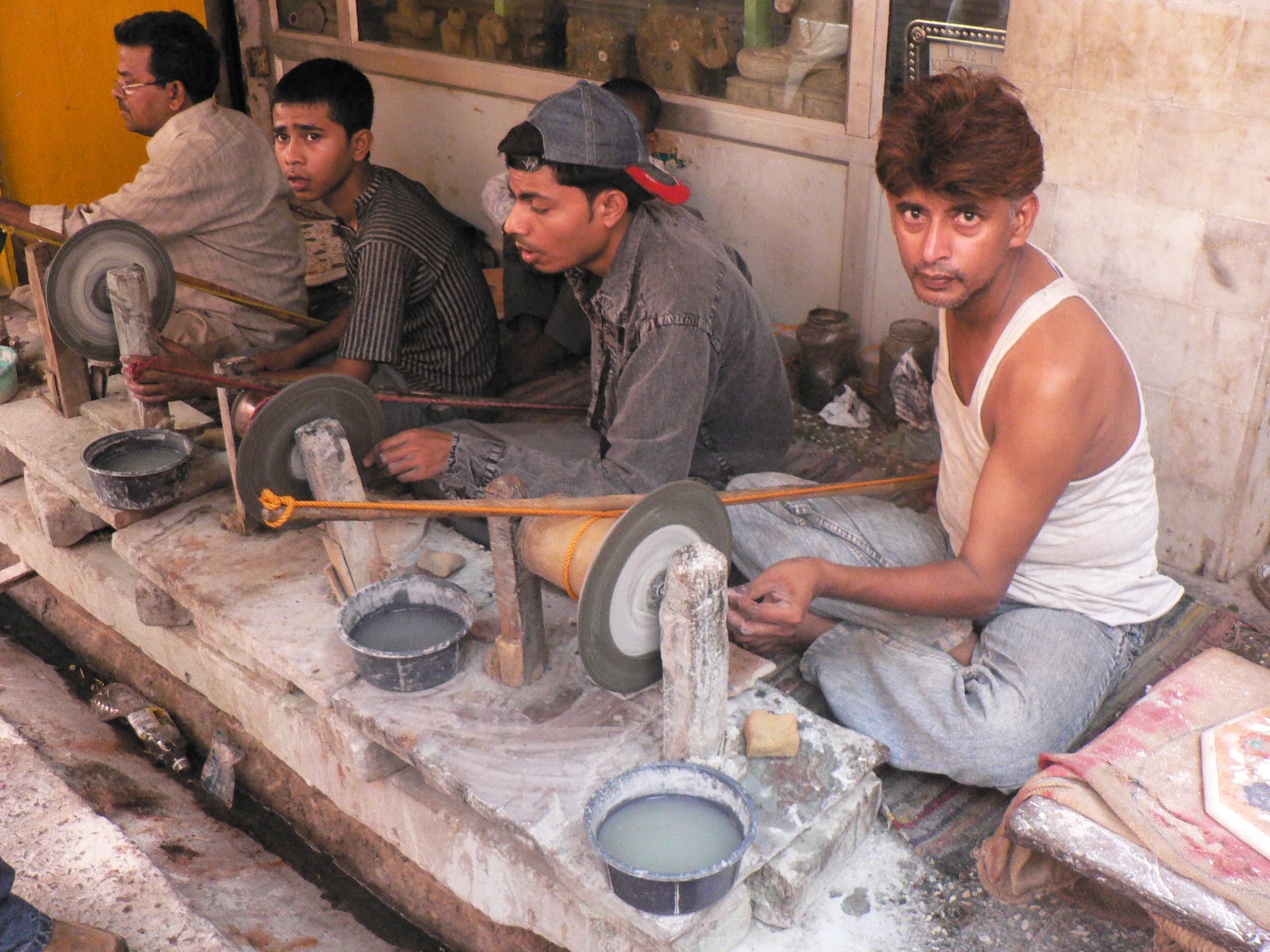 1.2 only